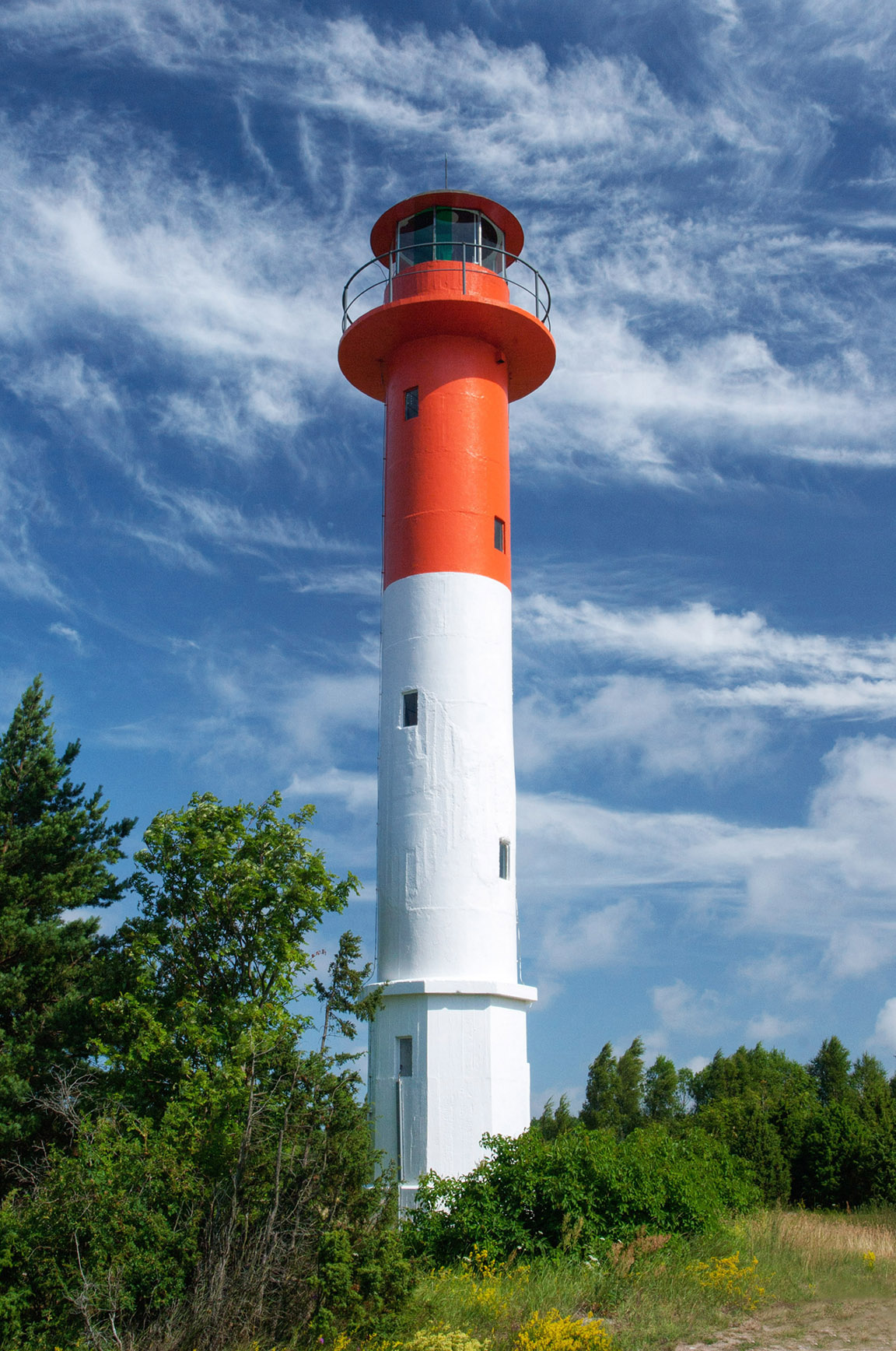 Sõru ülemine tuletorn